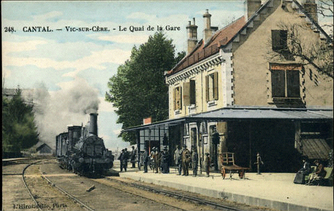 Gare de Vic-sur-Cère, Cantal, Auvergne, France. Ligne de l'ancienne Compagnie de Chemin de Fer de Paris à Orléans. Locomotive à vapeur. Carte postale vers 1900.